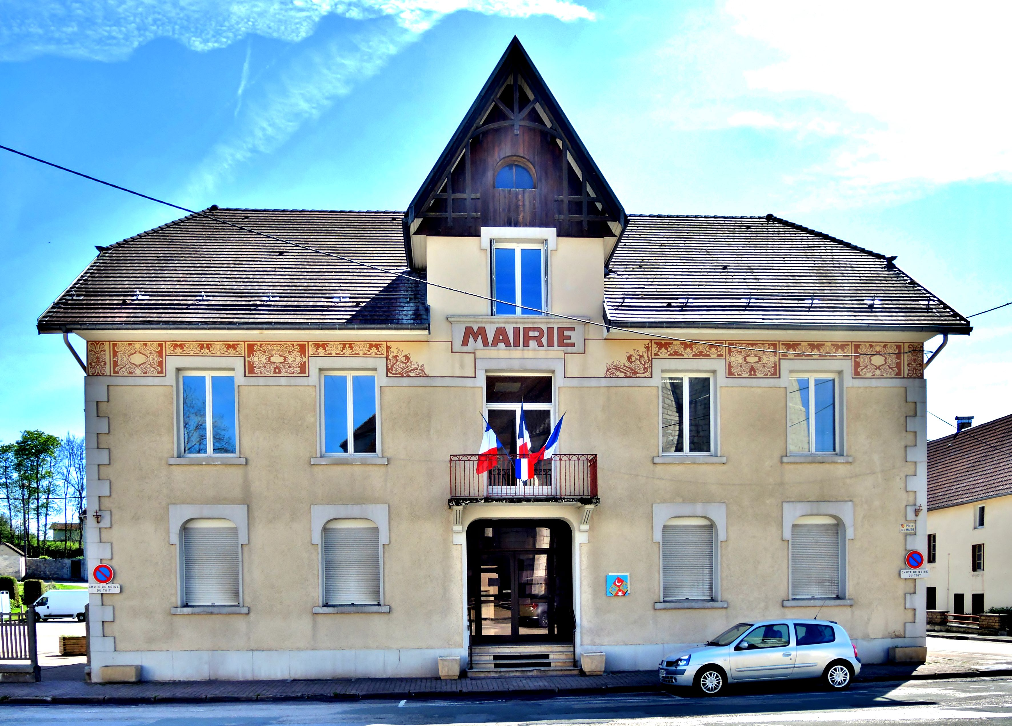 Mairie de Pierrefontaine-les-Varans. Doubs